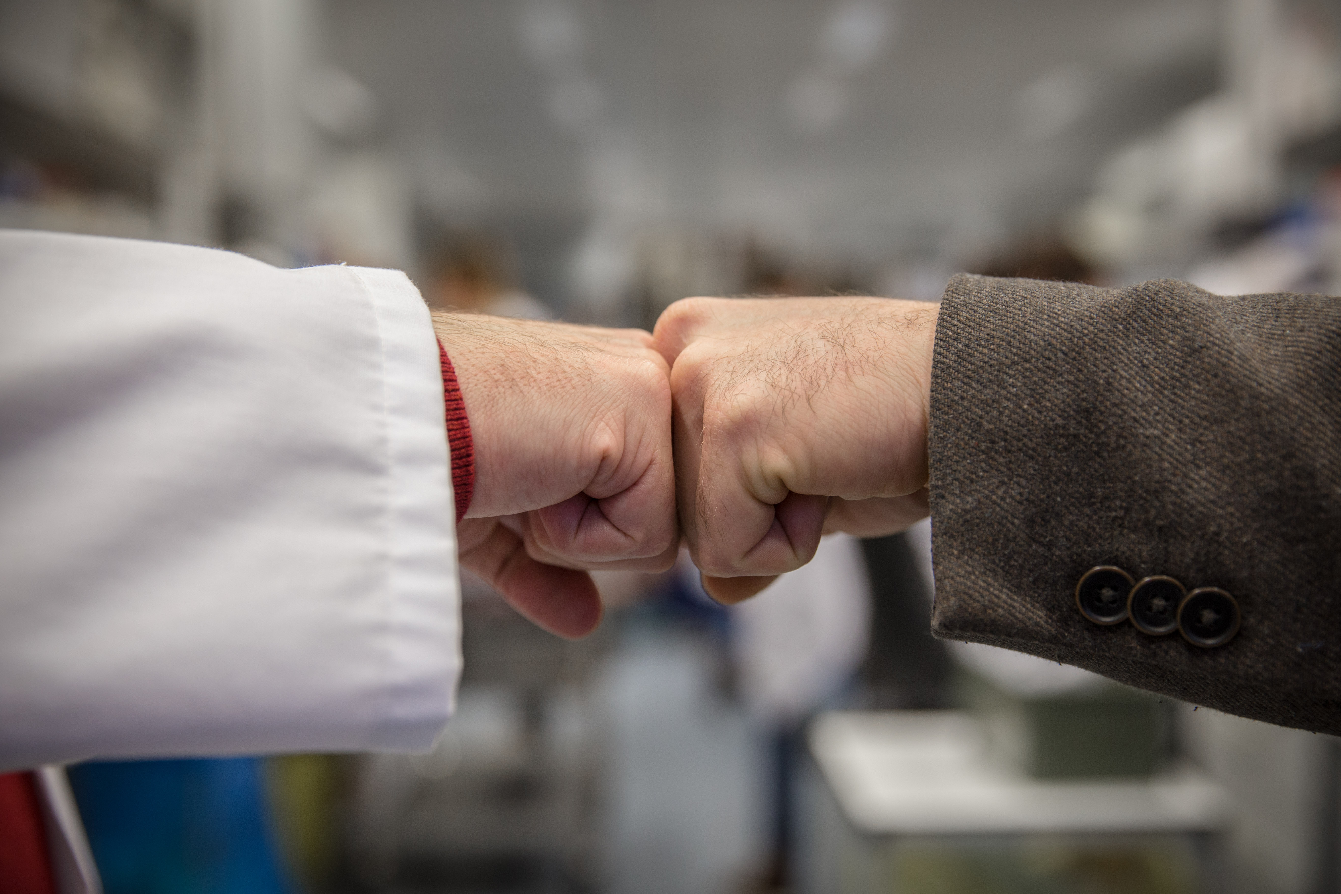 Het vuistje of de zogenaamde fist-bump, een informele groet.